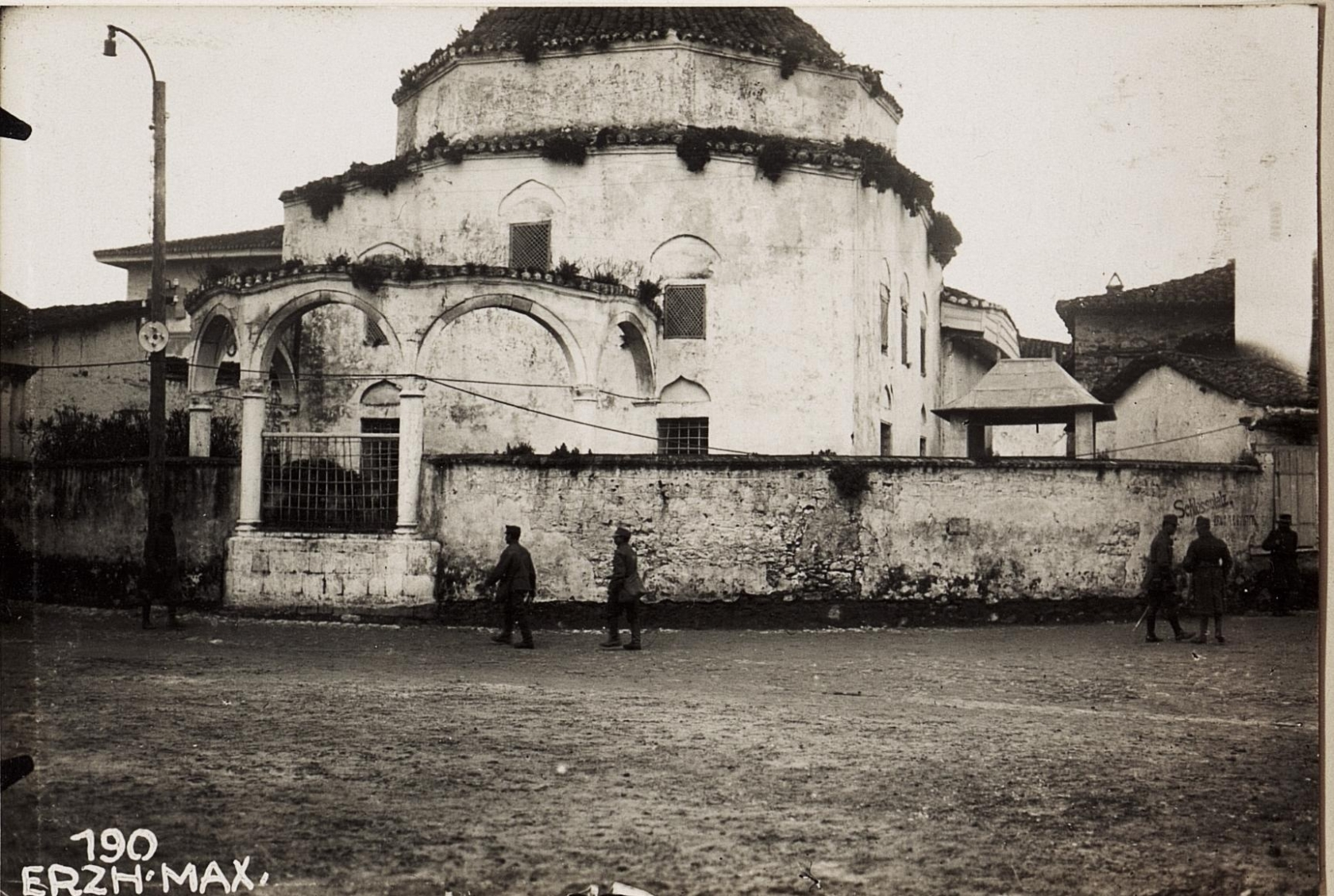 Alte Moschee am Burgplatz von Durazzo.